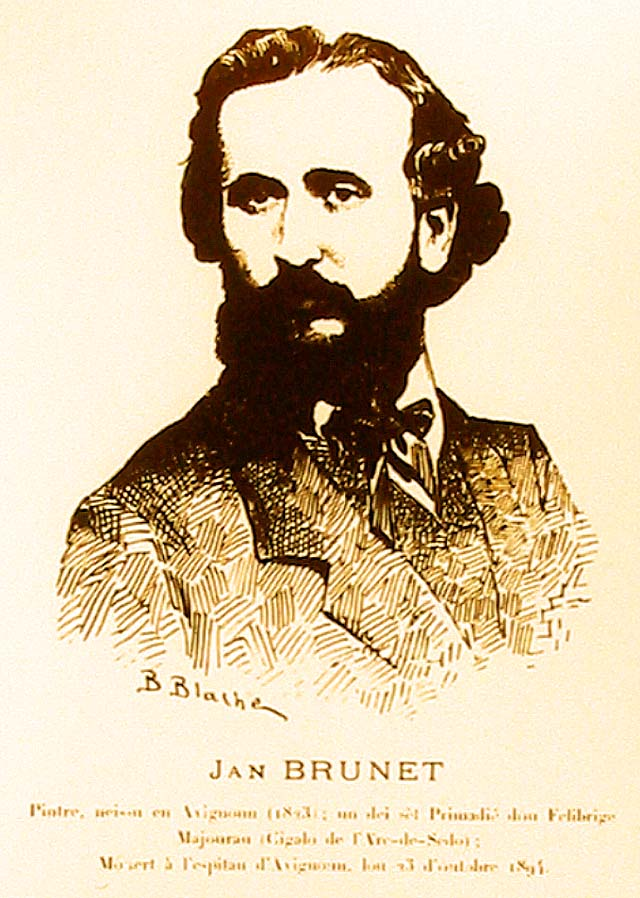 Jean Brunet, co-fondateur du Félibrige avec Frédéric Mistral